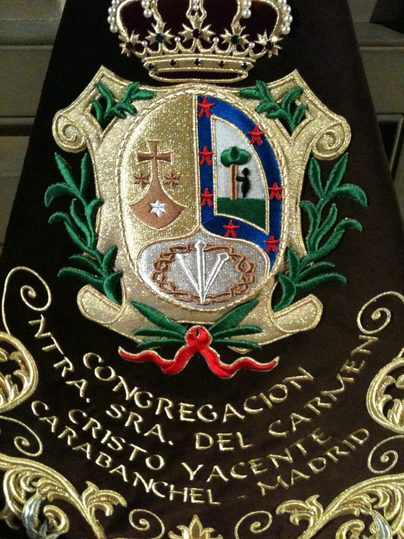 Escudo de la Congregación bordado en estandarte